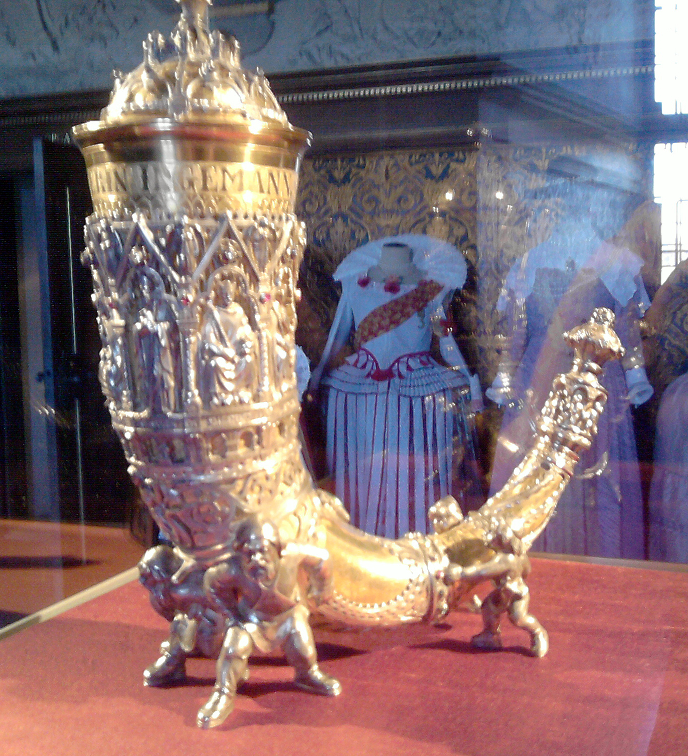 Guldhornet som digteren B.S. Ingemann fik foræret af danske kvinder i 1859 da han fyldte 70 år. Udstillet i glasmontre på Frederiksborg Slot.